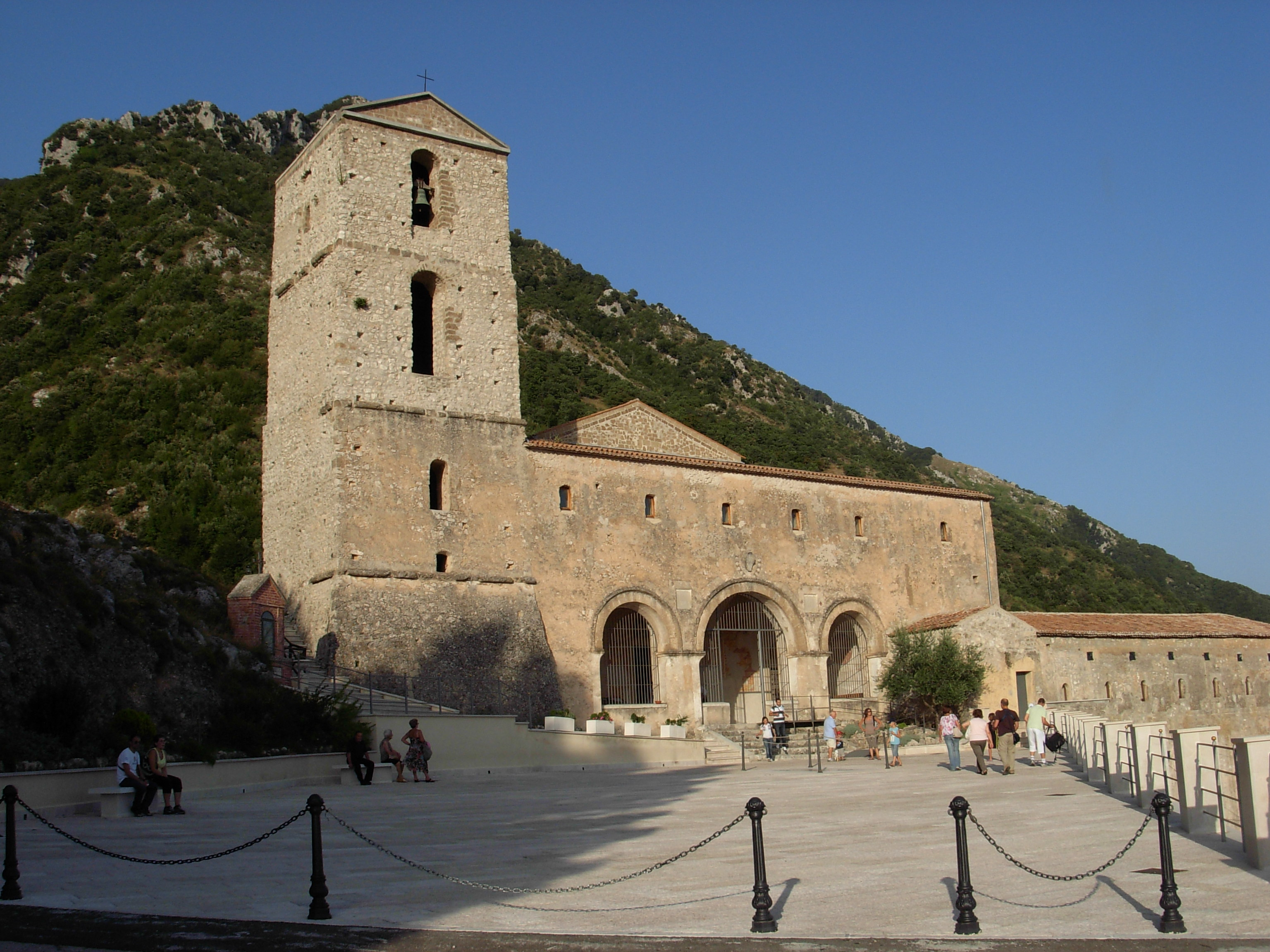 Il santuario di Maria Santissima del Monte Taburno a Bucciano (BN)